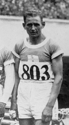 Olympische Spelen 1928 Amsterdam, Nederland. Atletiek. Finse marathonlopers. Väinö Sipilä.